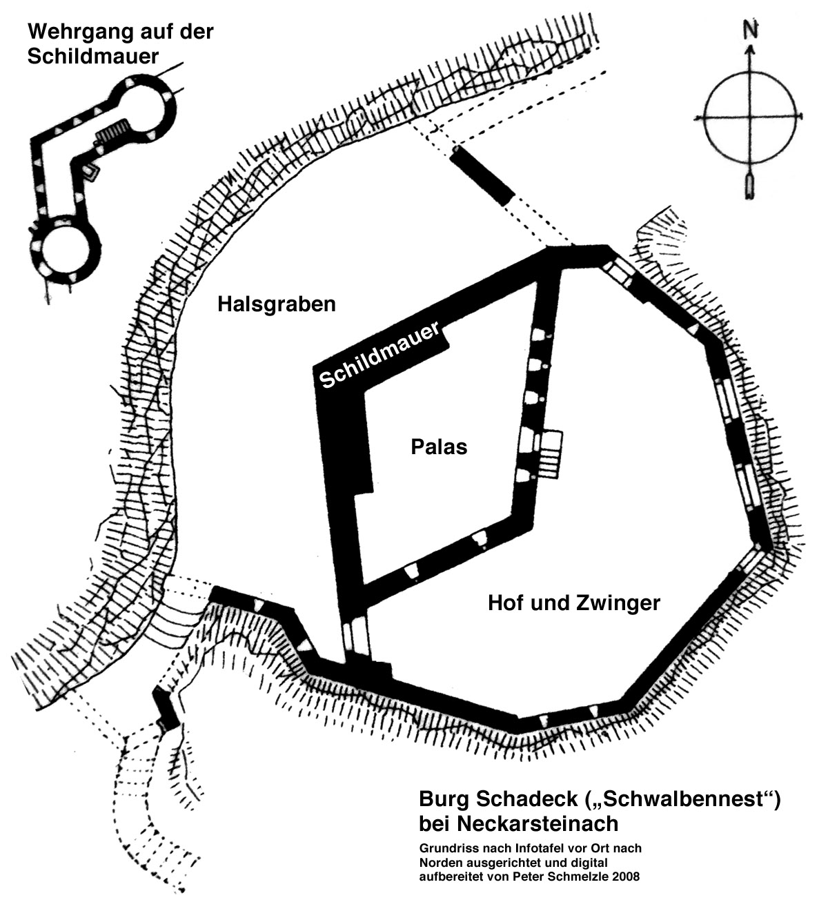 Plan der Burg Schadeck (Schwalbennest) bei Neckarsteinach